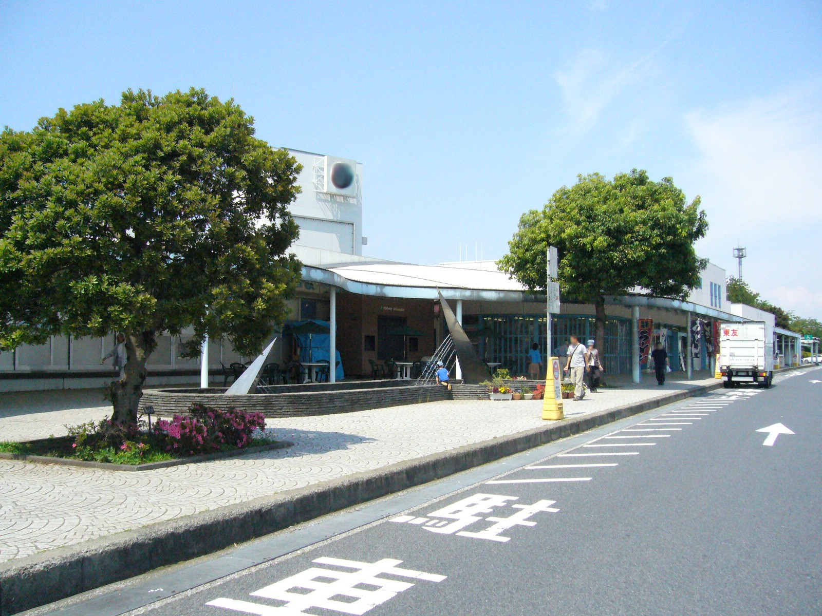 kaihinn-makuhari-P.A.-higashi-kanto-expressway-japan